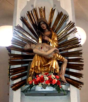 Pfarrkirche Mariä Himmelfahrt, Steinhausen an der Rottum: Pietà (Gnadenbild), um 1350